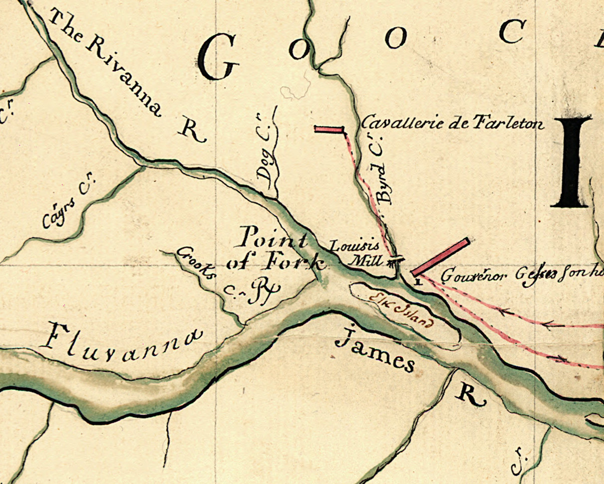 Detail showing Point of Fork in Fluvanna County, Virginia, from a map entitled Campagne en Virginie du Major Général M'is de LaFayette : ou se trouvent les camps et marches, ainsy que ceux du Lieutenant Général Lord Cornwallis en 1781